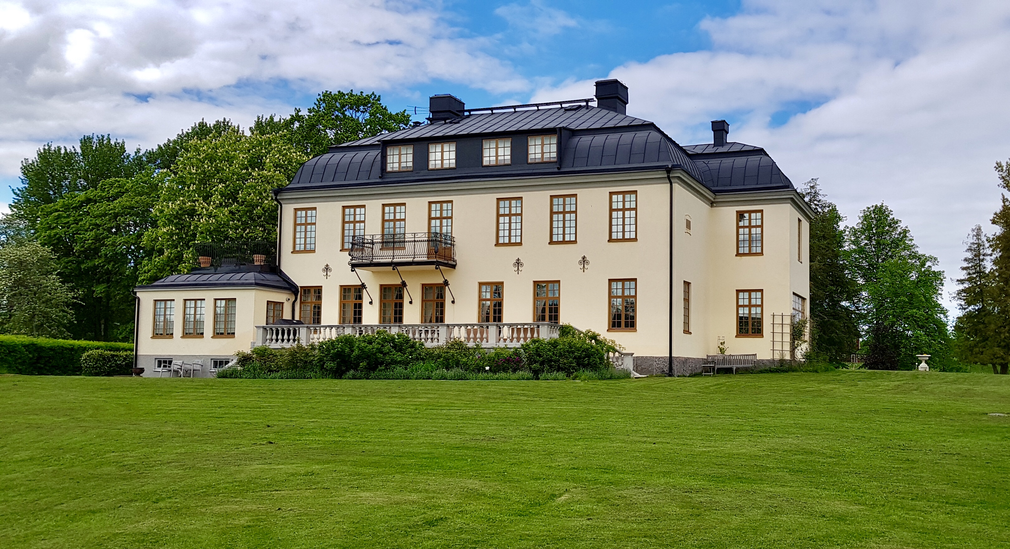 Boxtorp från sjösidan 2019